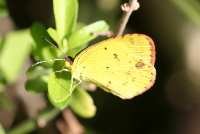 Eurema lisa